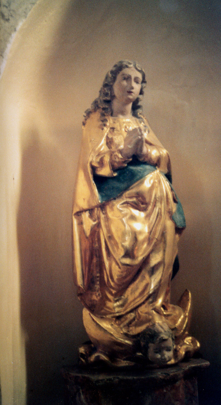 Cucugnan (Aude) - Vierge